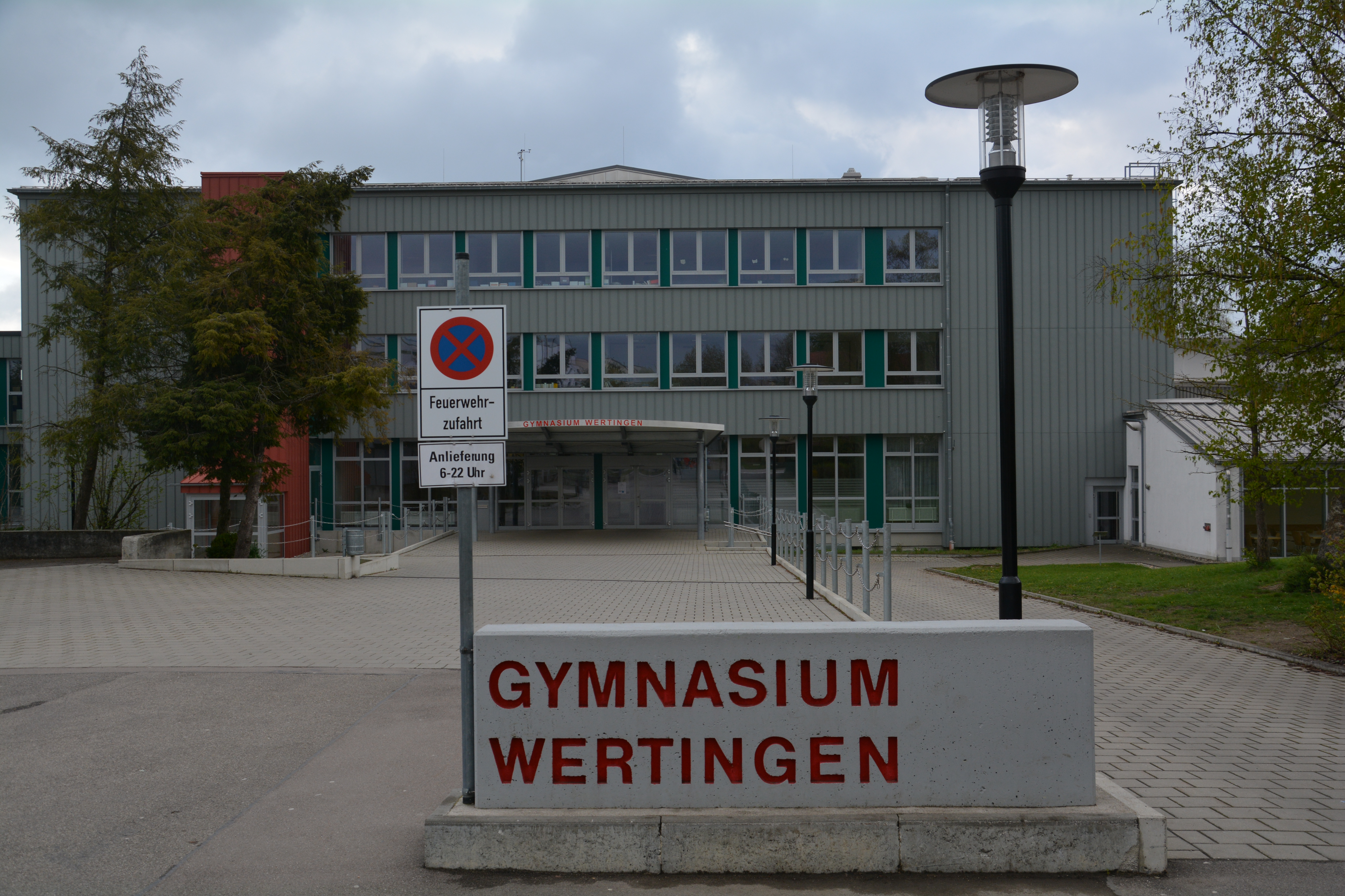 Das Gymnasium Wertingen in Wertingen im Landkreis Dillingen.